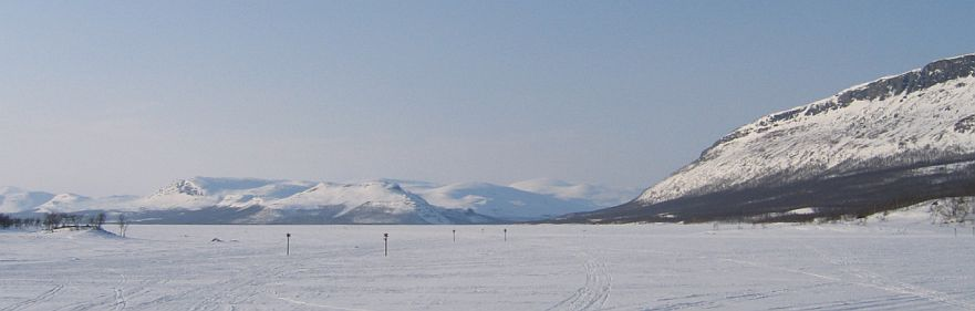 Kilpisjärven pohjoispäätä: Vasemmalla Mallatunturit, oikeassa laidassa osa Saanaa. Kevättalvi 2004. Huom: Muista säilyttää viittaus kuvaajaan, mikäli käytät kuvaa.